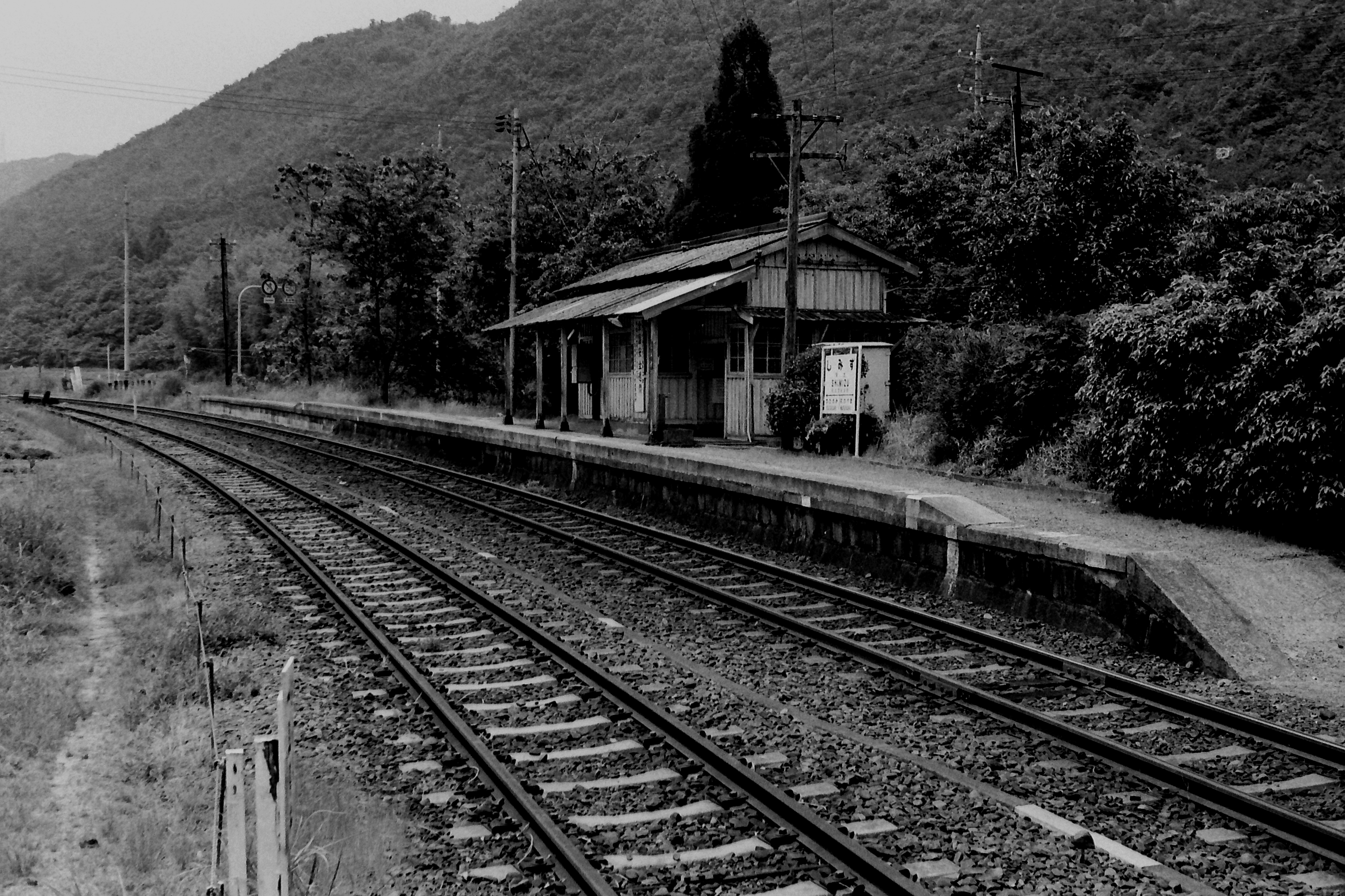 同和鉱業片上鉄道清水駅構内、1990年6月撮影